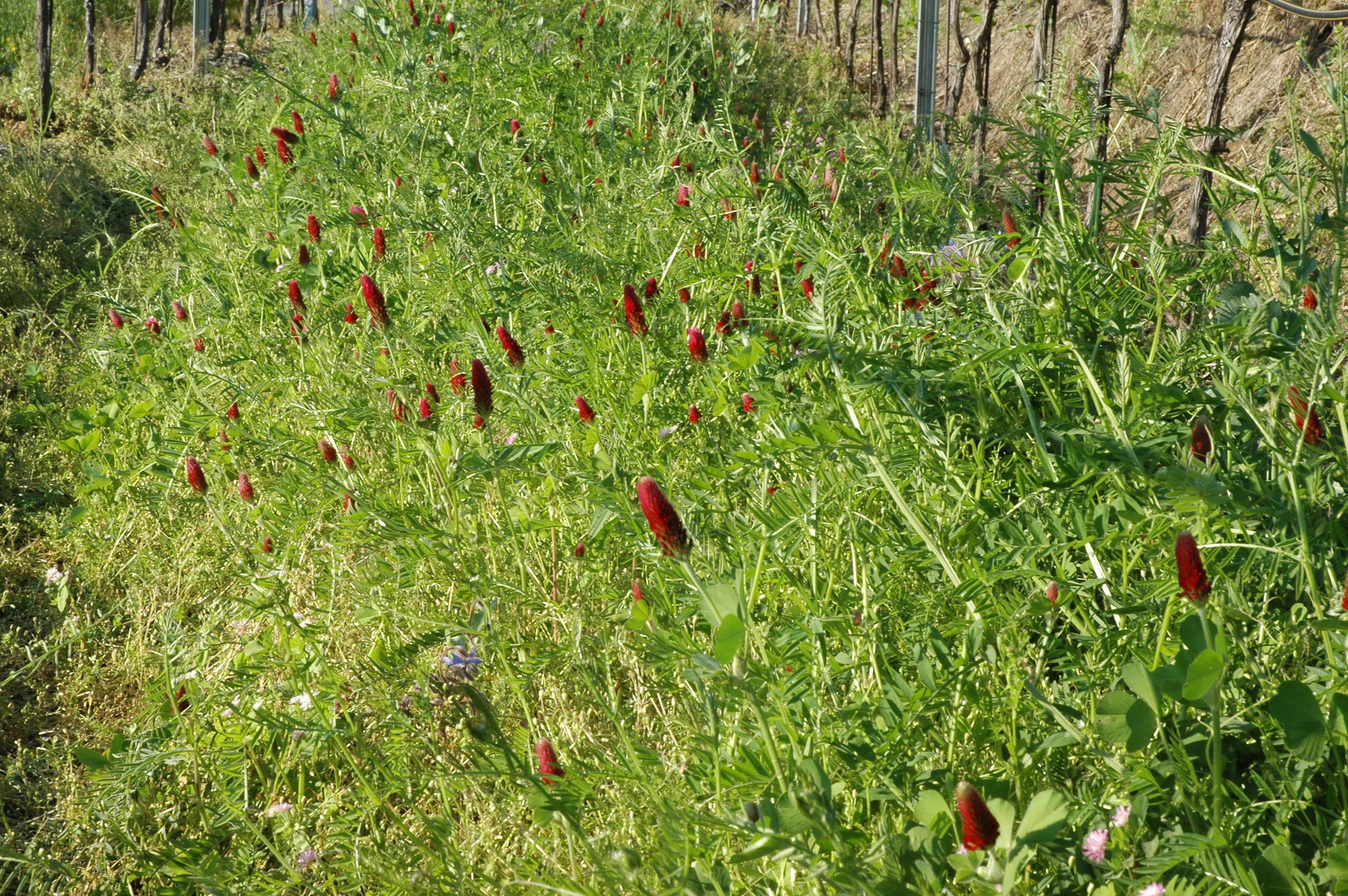 Ansicht einer artenreichen Begruenung in der Fahrgasse eines Weingartens.